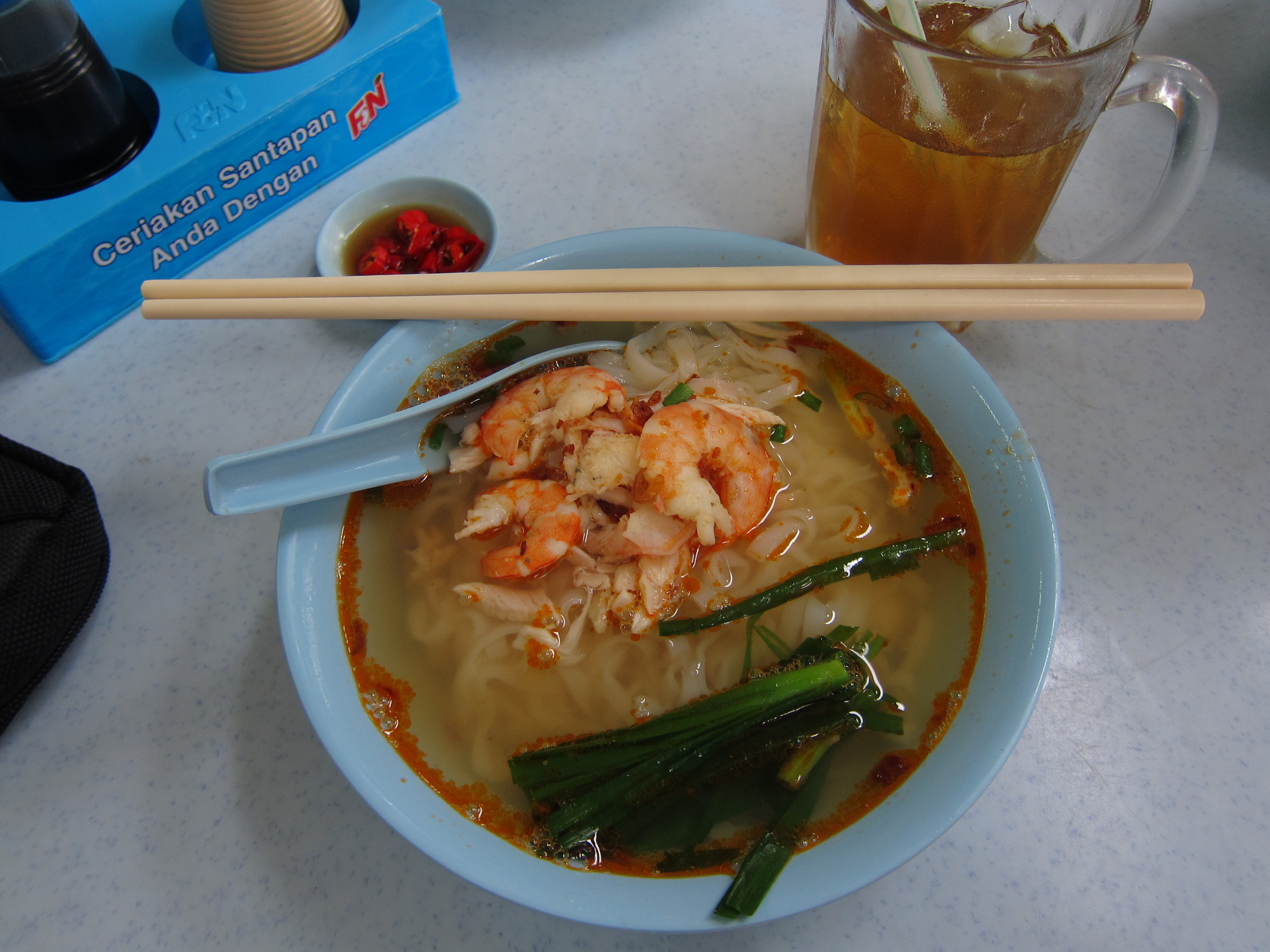 Ipoh Chicken Hor Fun